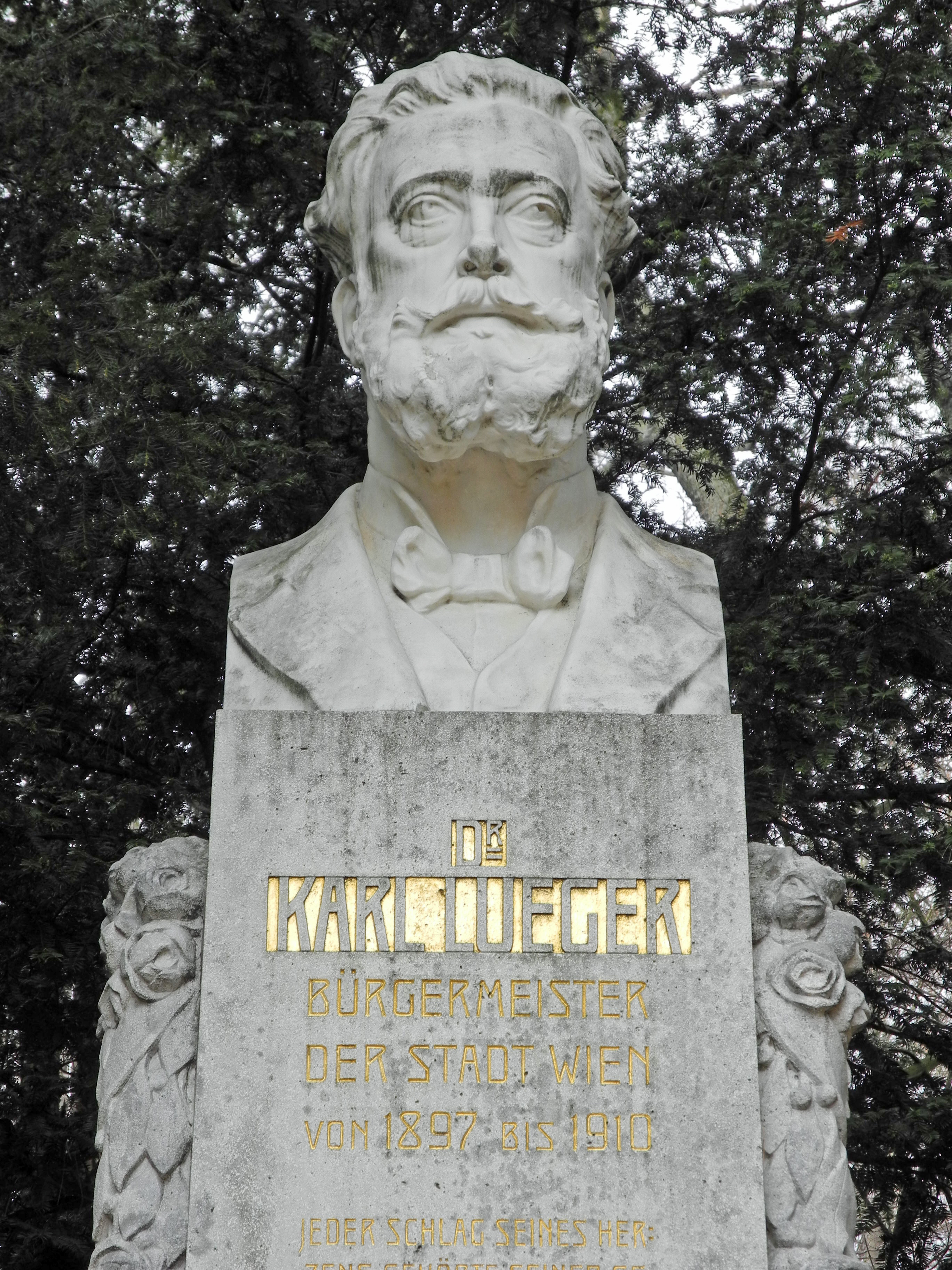 Dr.-Karl-Lueger-Denkmal